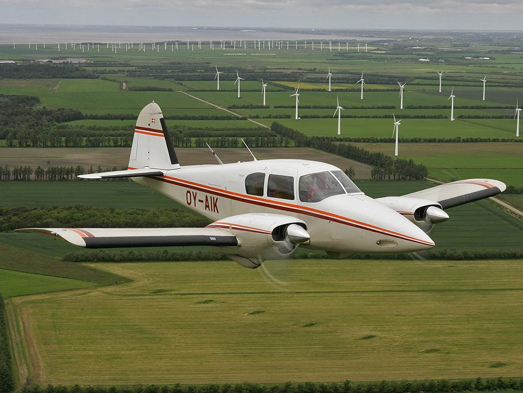 Pa-23F OY-AIK